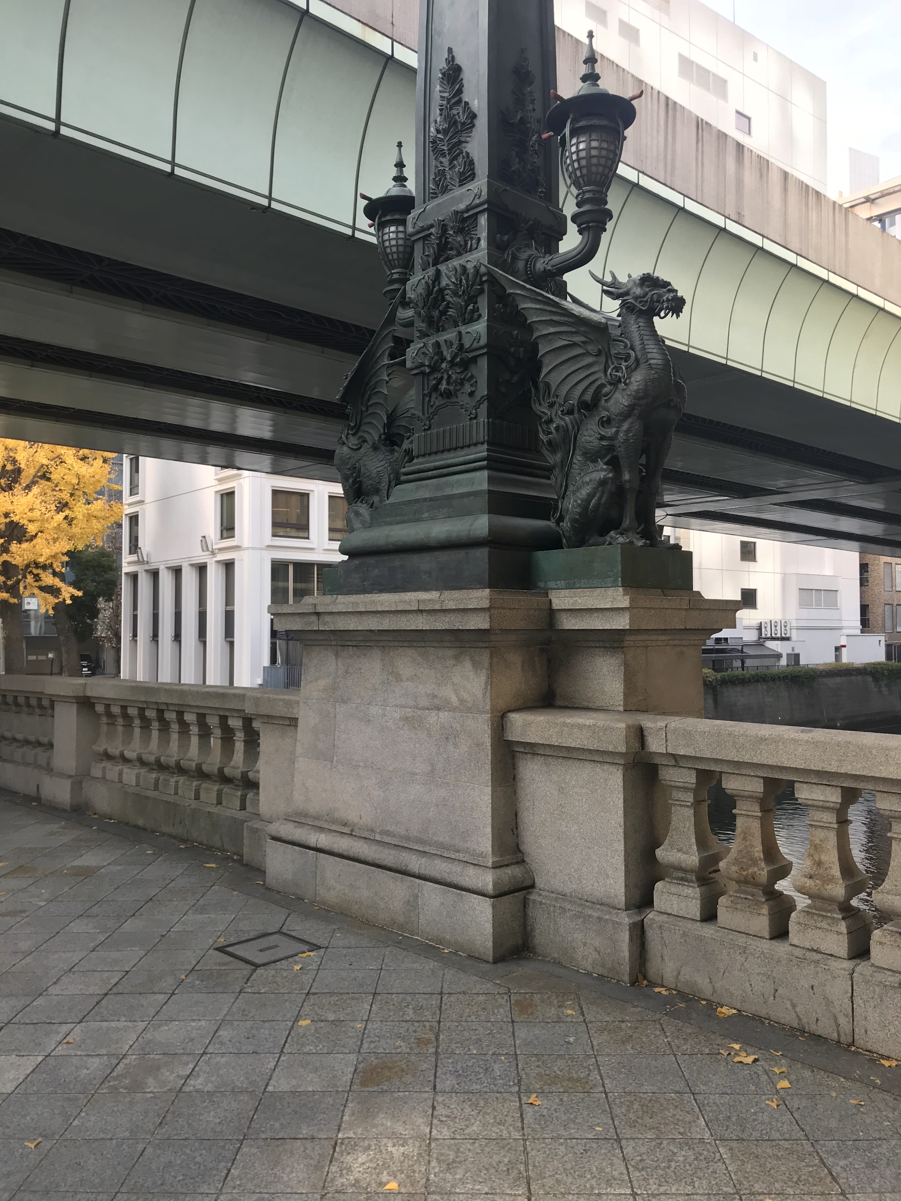 日本橋（東京都中央区）にある麒麟の像